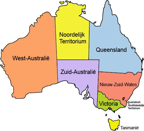 Staten en territoria van Australië.